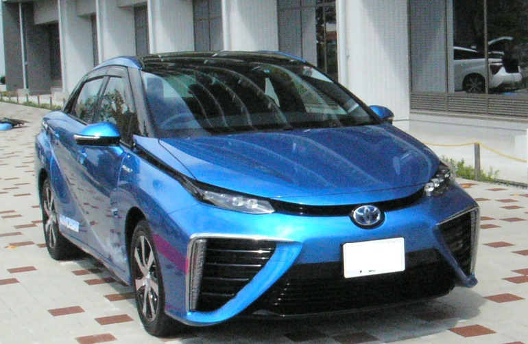 MIRAI